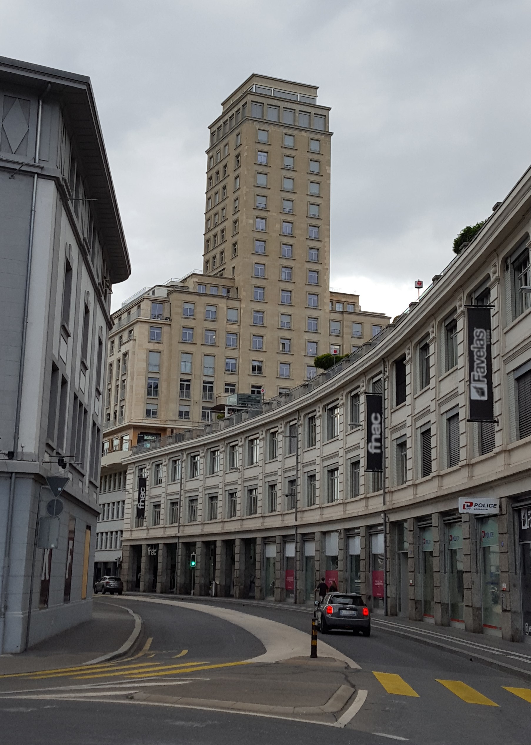 La Tour de Bel-Air, à Lausanne, en Suisse, vue depuis la rue de Genève